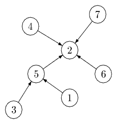 Nach innen gerichteter Baum mit Wurzel